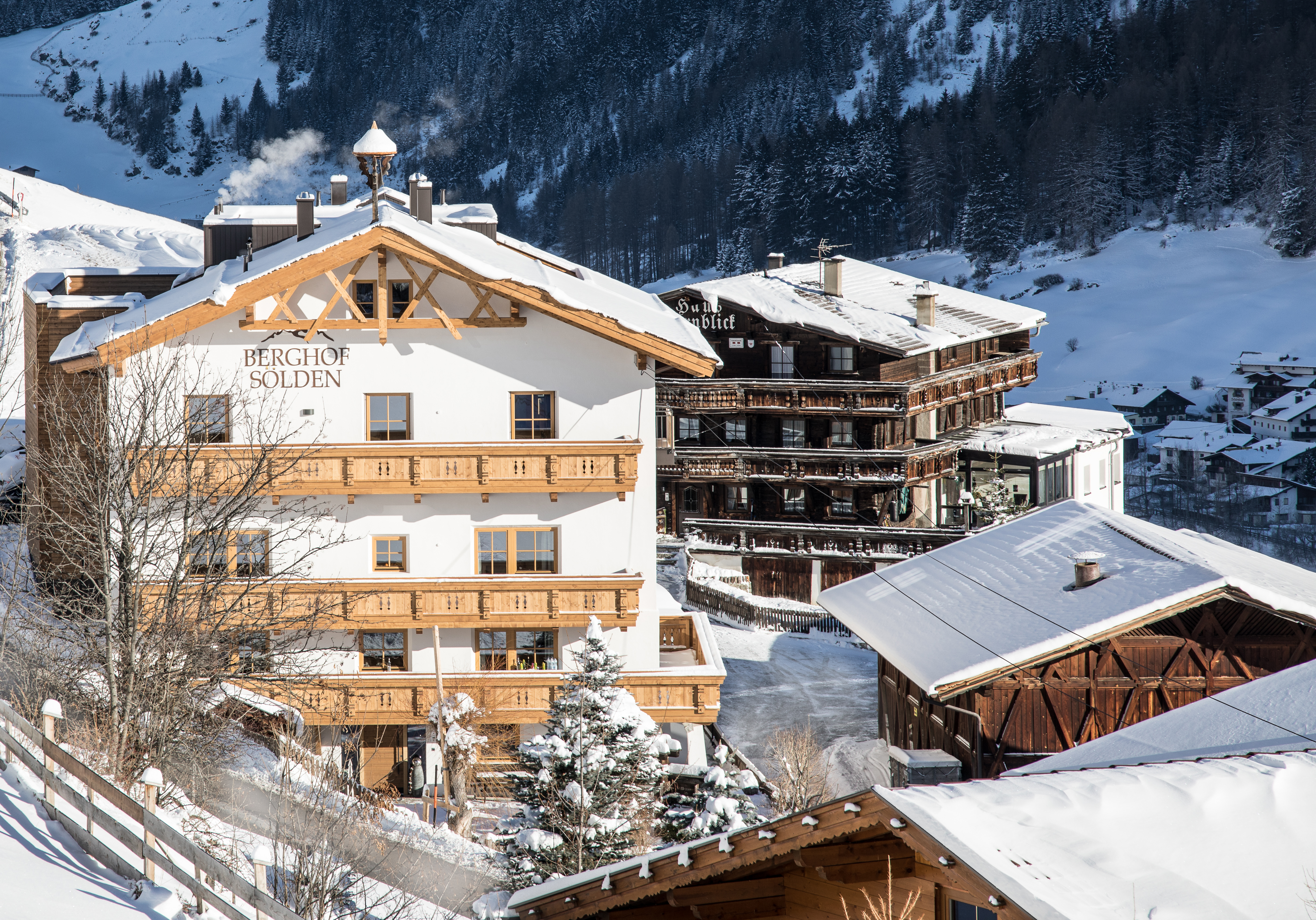 old houses in Soelden/Sölden/Solden Austria/Österreich/Osterreich